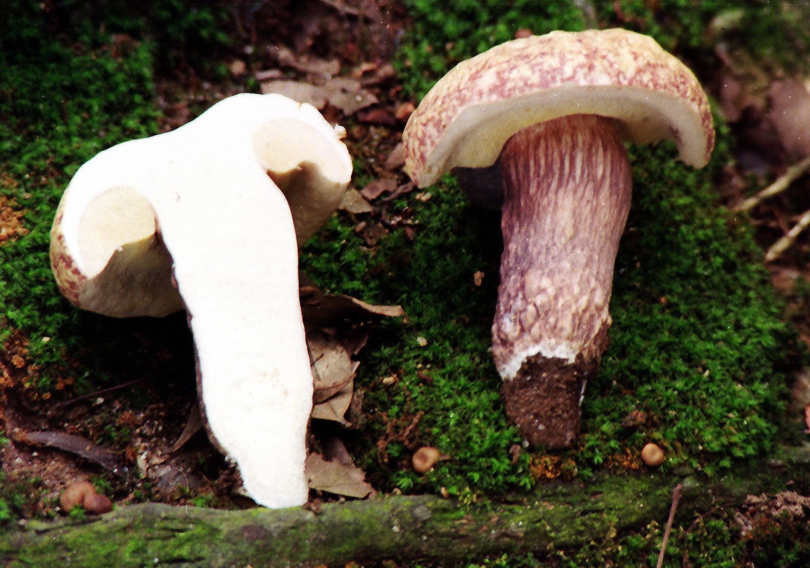 Boletus violaceofuscus 1996 09 22 Cèpe violet (ムラサキヤマドリタケ), Kyôto, Fushimi-Inari (Japon)